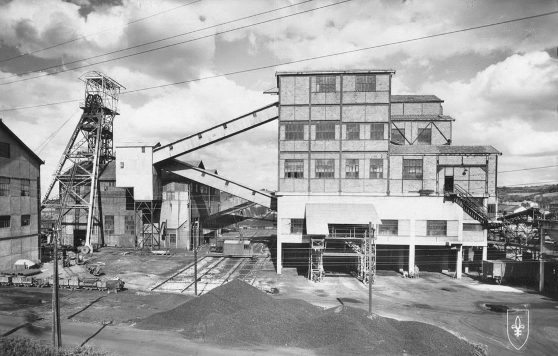 Le puits Saint-Joseph situé à Saint-Eloy-Les-Mines.